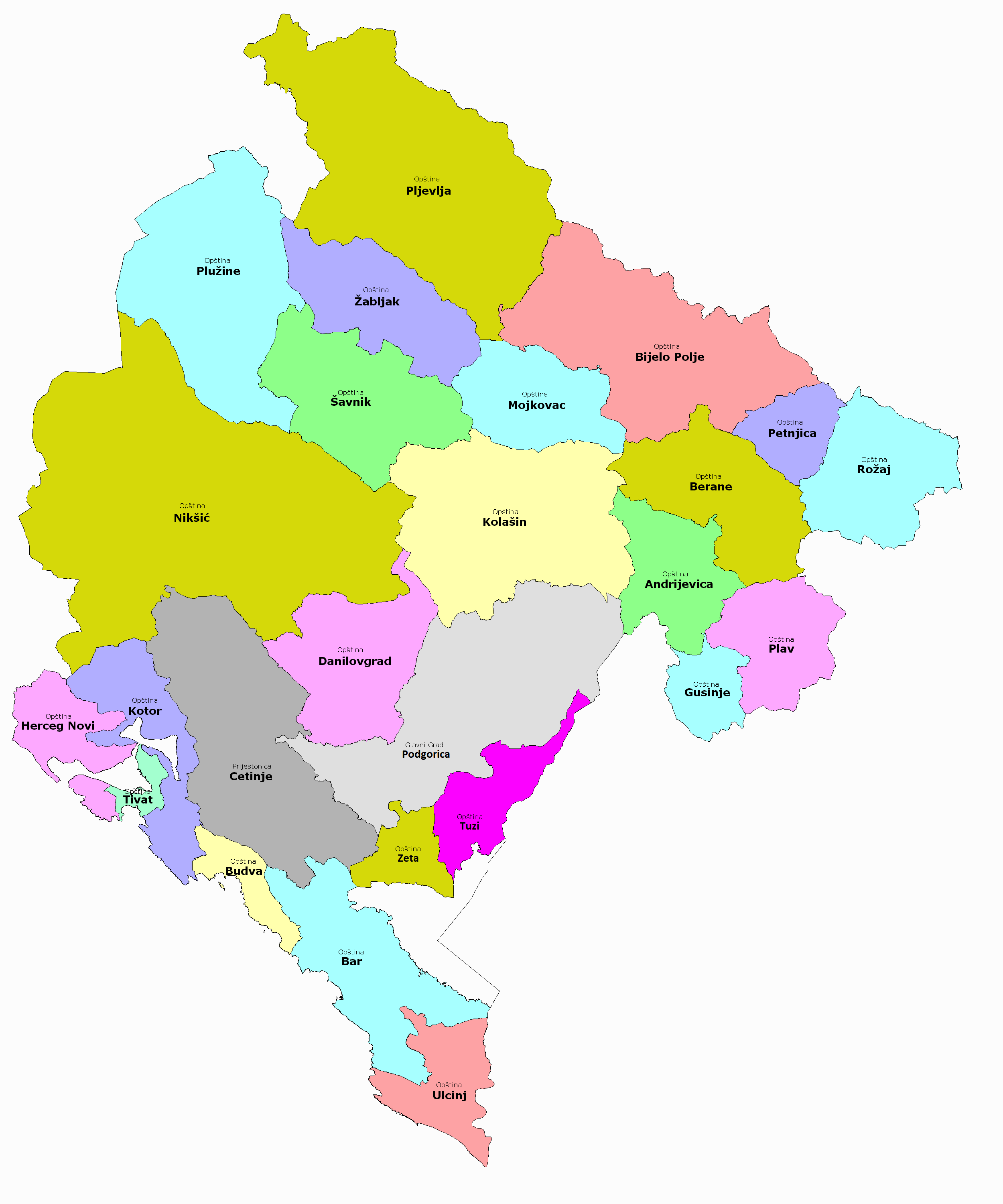 Подјела Црне Горе по општинама 2012. године